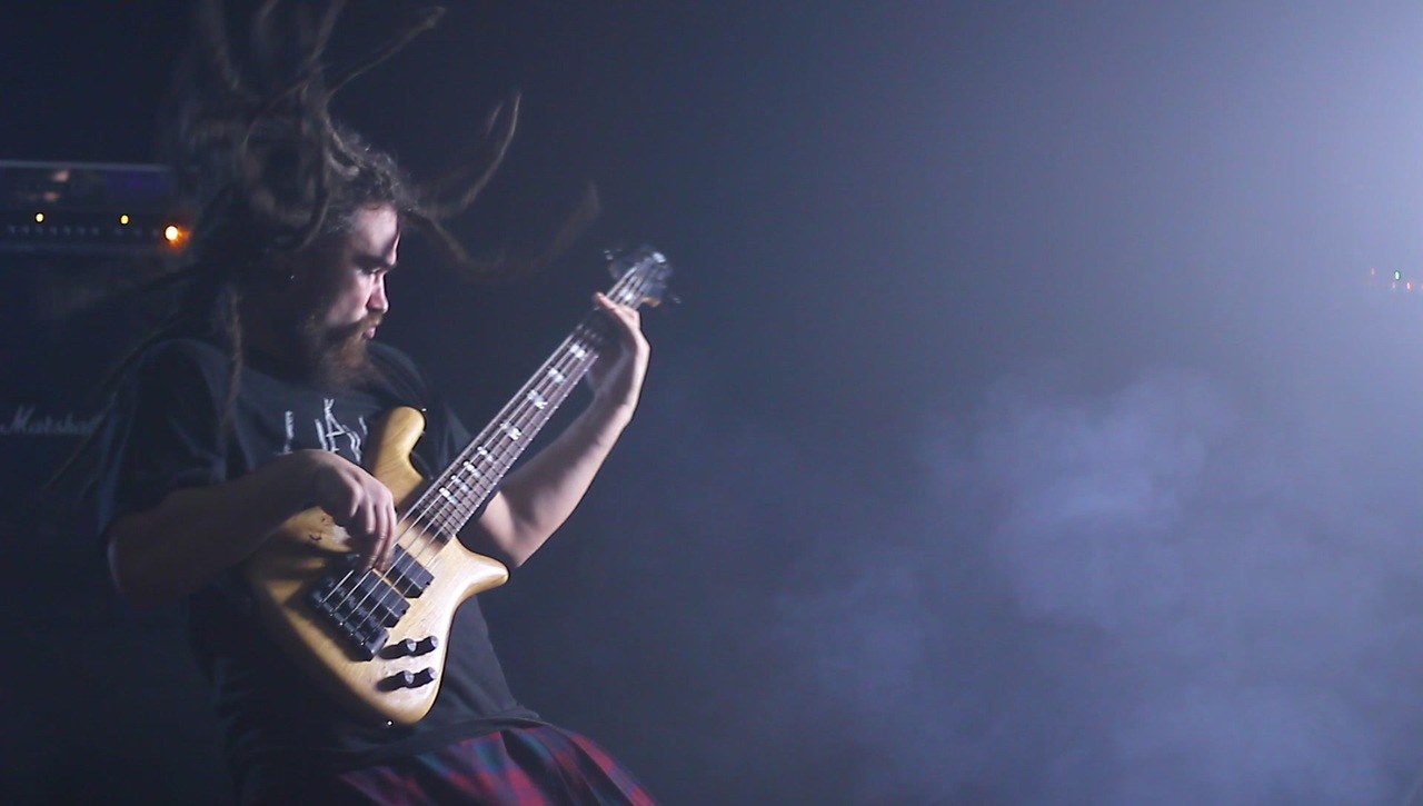 jinjerEAaL